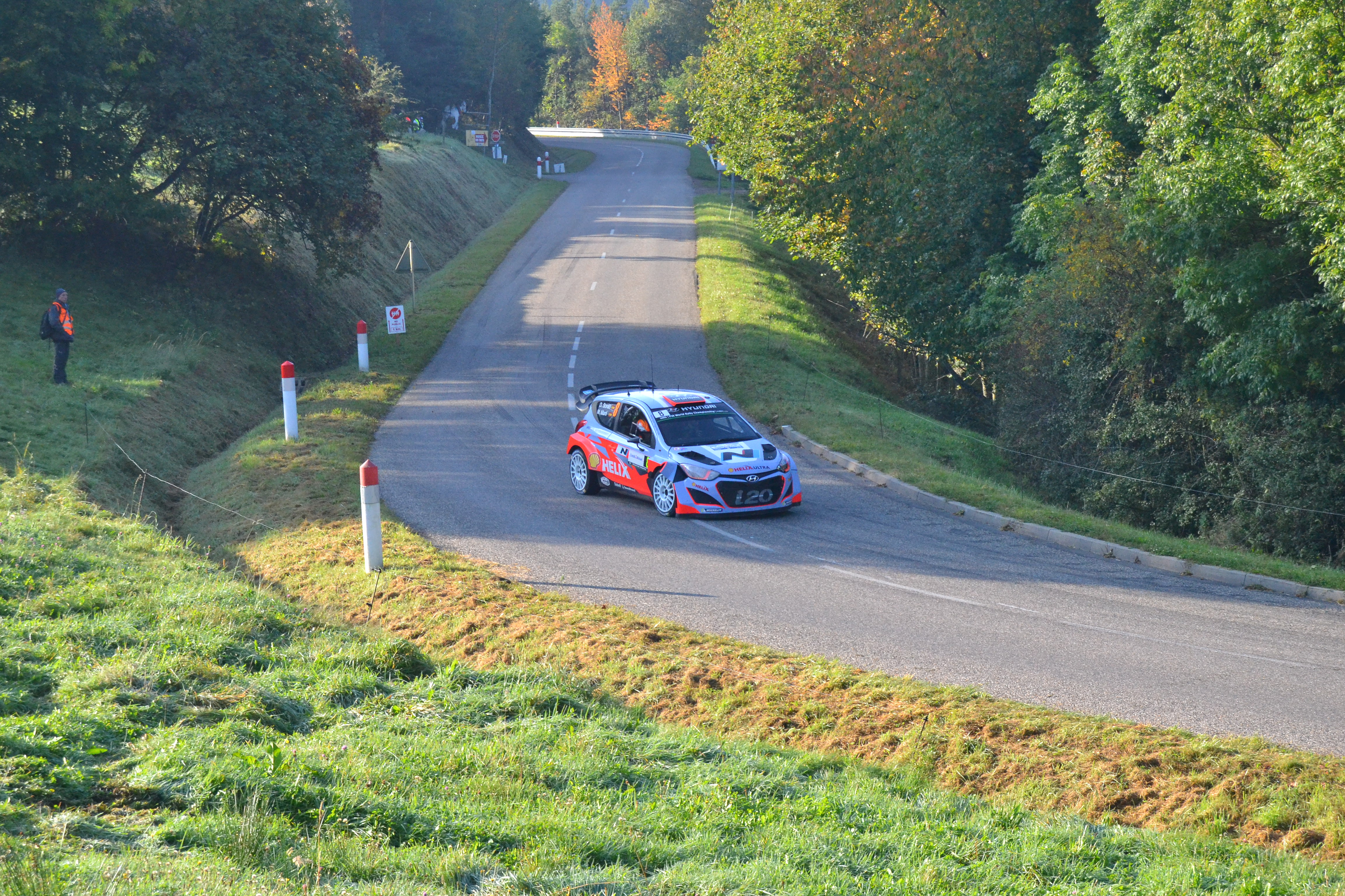 Rallye WRC France-Alsace 2014, ES9 Soultzeren - Le Grand Hohnack 1 à Labaroche. Hyundai i20 WRC - Dani Sordo - Marc Marti